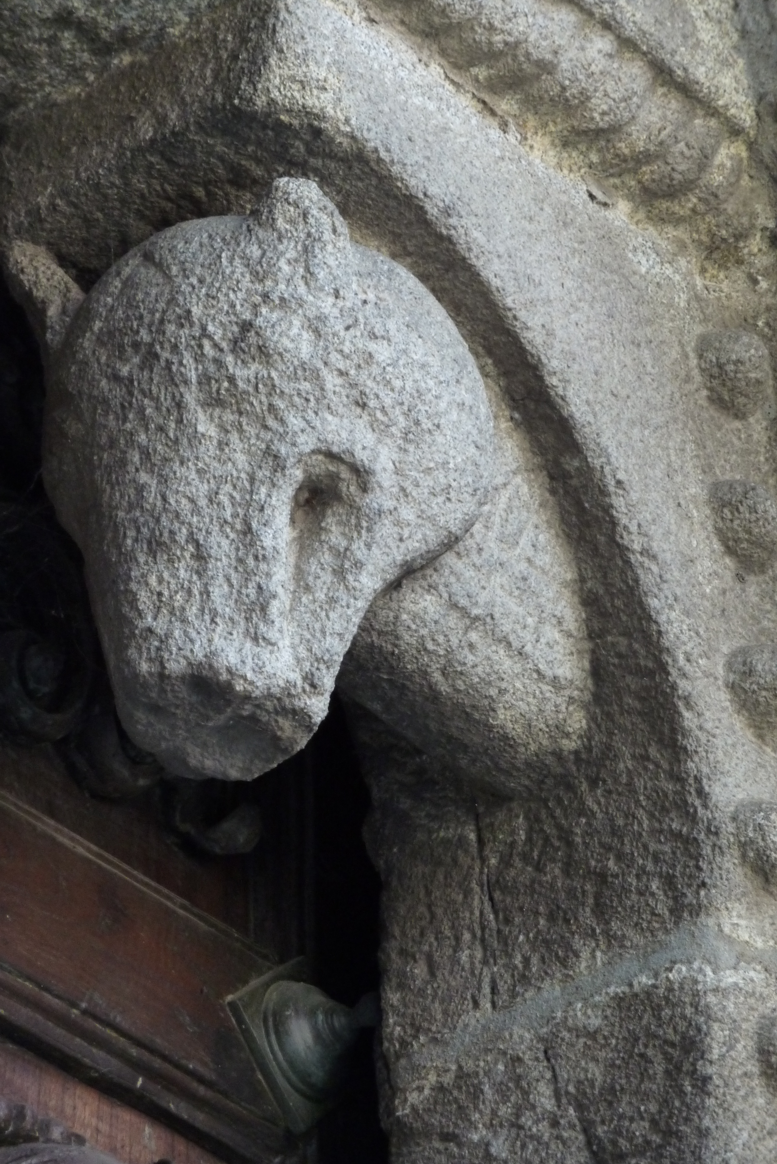 Kathedrale von Tui (Galicien): Mocheta beim Seiteneingang